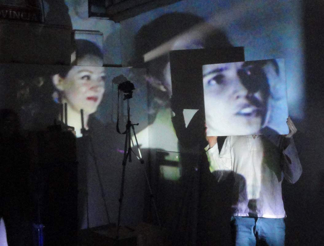 Parte de performance Incursões especulativas dentro e fora do cone, de Chico Machado, Porto Alegre. Projeção de vídeo sobre várias superfícies.